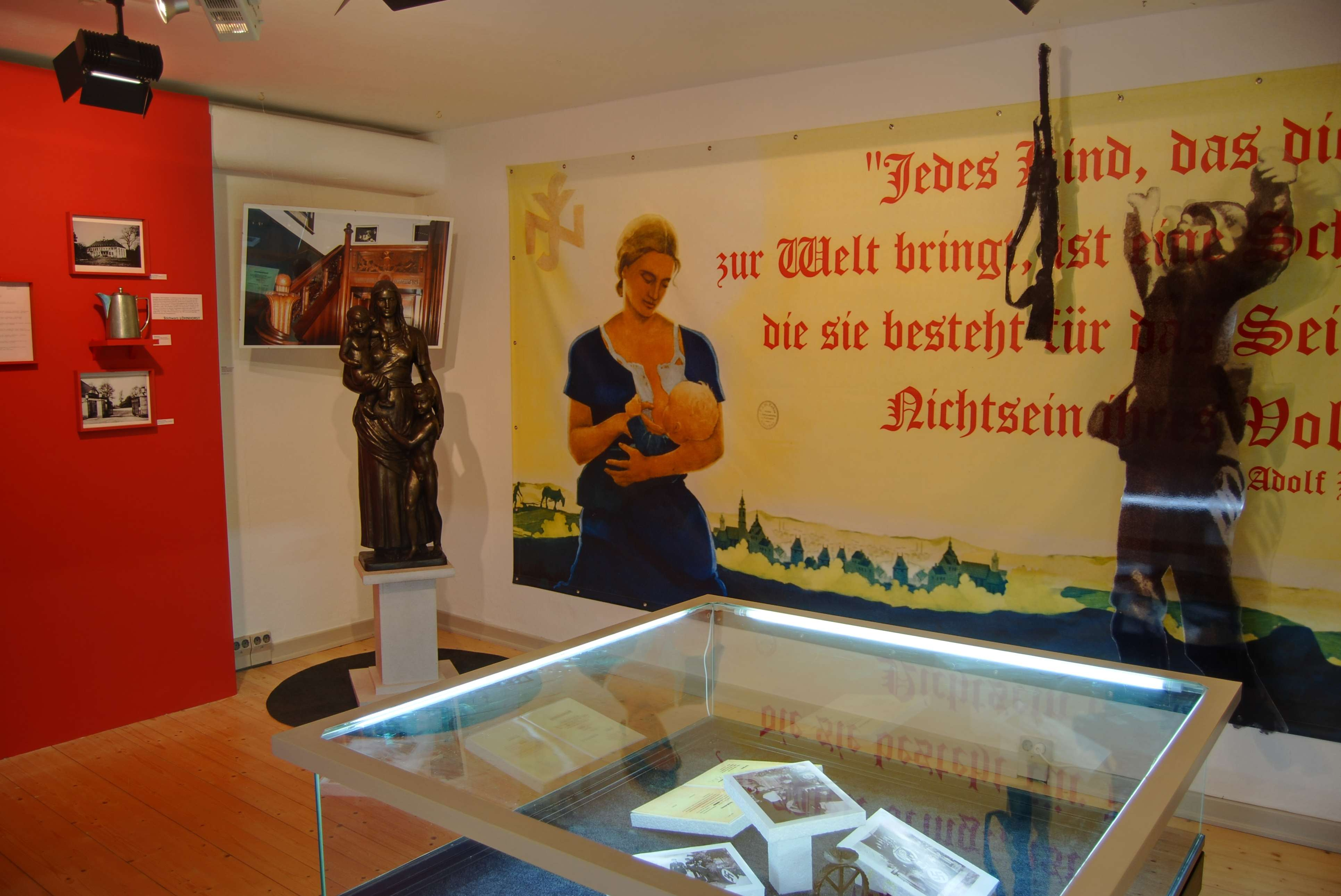 Teil des Ausstellungsbereichs zum Thema "Lebensborn" in der Gedenkstätte Baracke Wilhelmine in Schwanewede-Neuenkirchen in Niedersachsen/Deutschland.